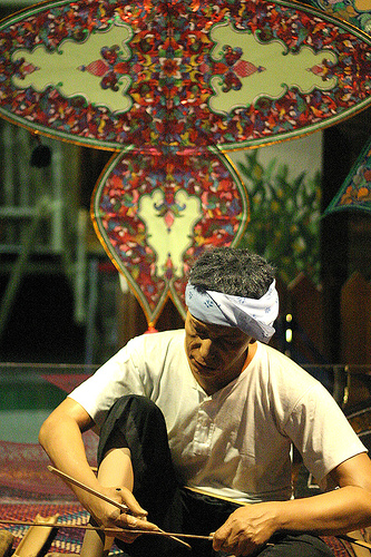 Making traditional kite, a diorama in Muzium Negara, Malaysia